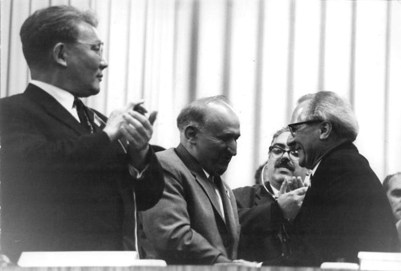 ADN-ZB Kollektiv 18-6-71-ba Berlin: VIII. Parteitag der SED - erster Beratungstag (15.6.)- Der Erste Sekretär des ZK der SED, Erich Honecker (r), dankt dem Ersten Sekretär des ZK der BKP, Todor Shiwkow (Mitte), für seine Begrüßungsansprache, die der hohe Gast am 15.6. an die Delegierten und Gäste des VIII. Parteitages der SED richtete; links der Erste Sekretär des ZK der MRVP, Jumshagin Zedenbal. (Rep.: Koard) VIII-B